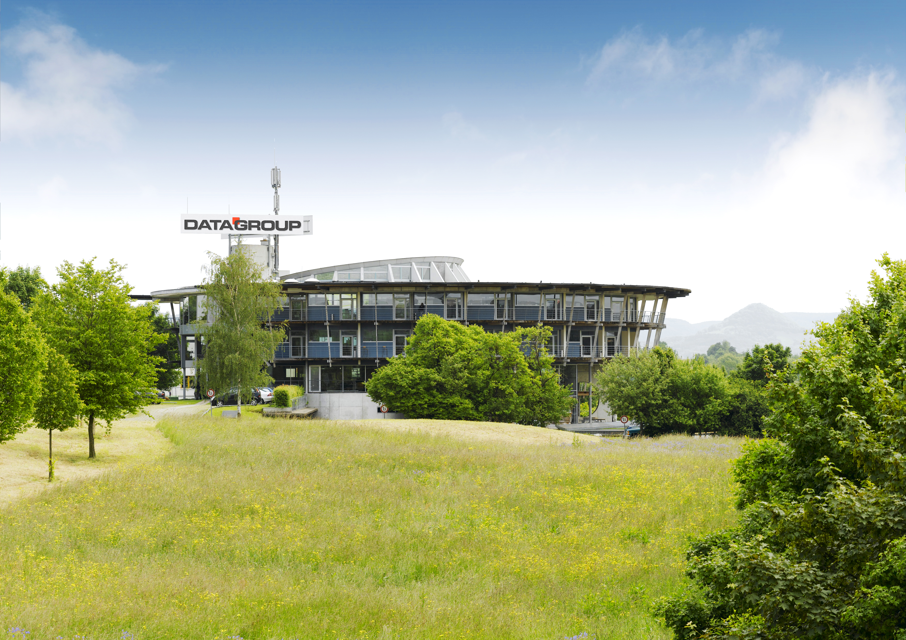 Hauptsitz von DATAGROUP in Pliezhausen